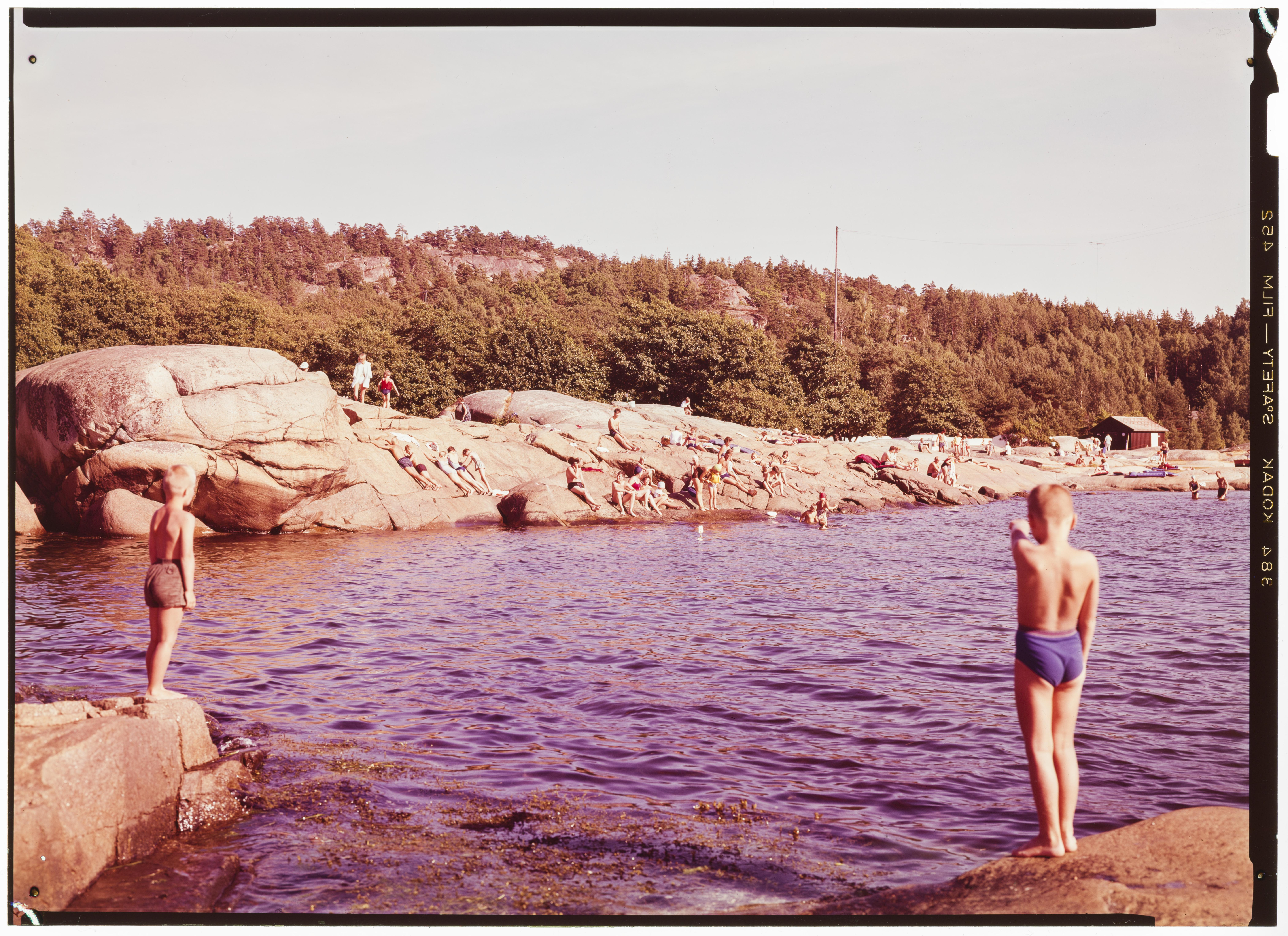 Bildet er hentet fra Nasjonalbibliotekets bildesamling. Anmerkninger til bildet var: Tittel er hentet fra emballasje. Sandefjord,Sandefjordsfjorden, Sandefjord, Vestfold